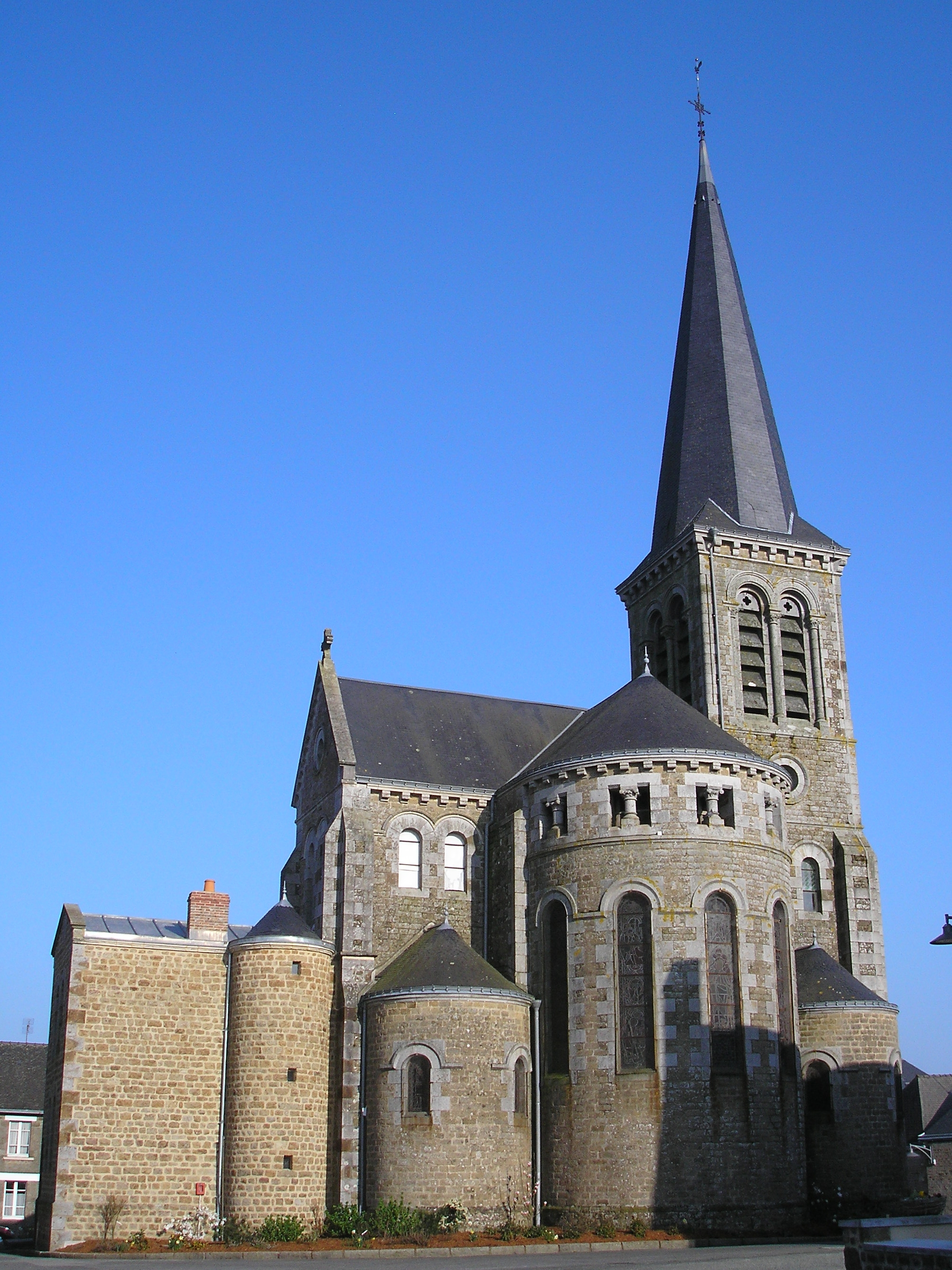 Carelles (Pays de la Loire, France). L'église Saint-Jean-Baptiste.